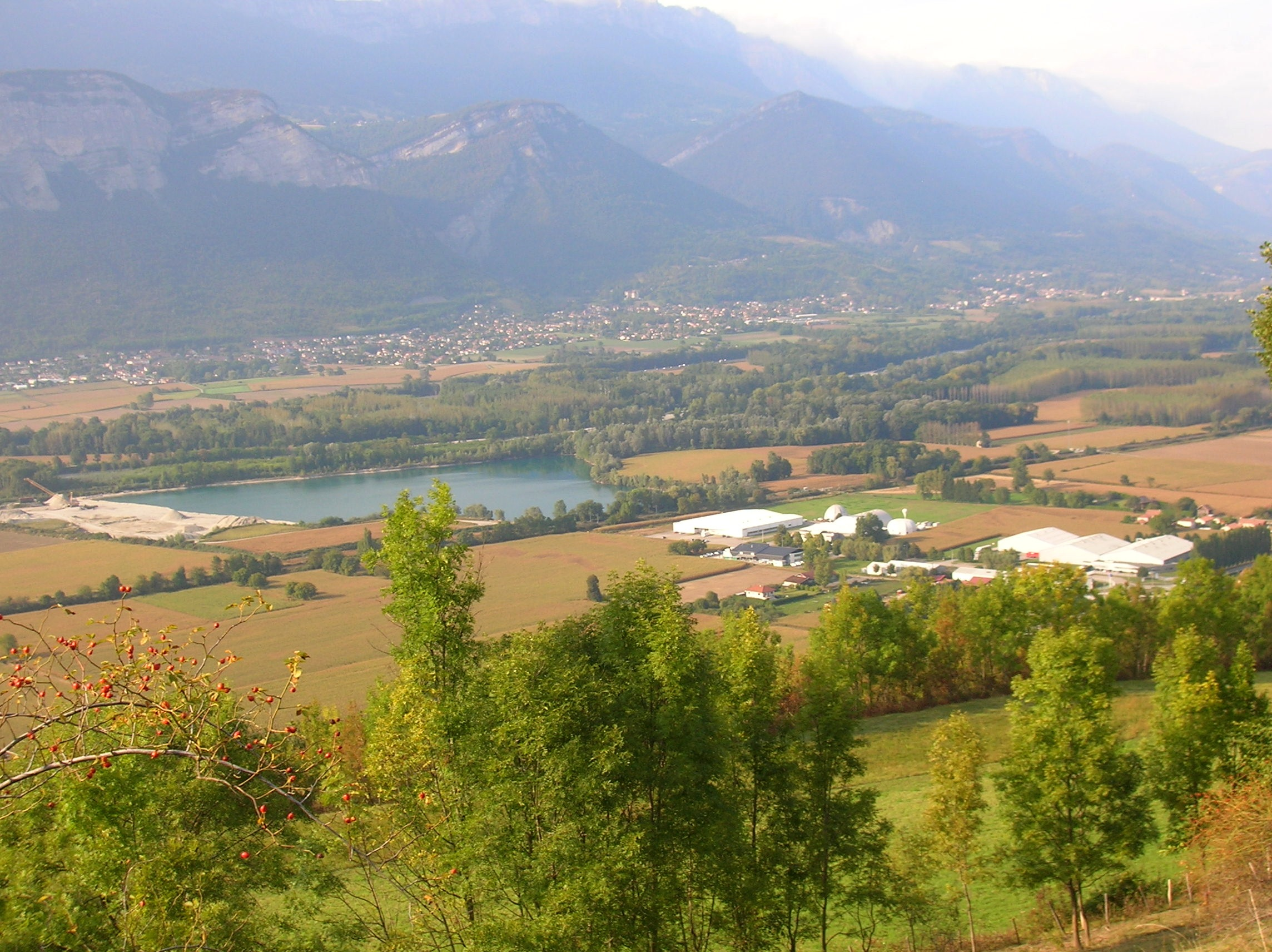 Carrière silico-calcaire d’origine fluviale de SMAG à gauche, au Grand Pré, Airstar à droite. panorama depuis Le Champ-près-Froges, Isère, AuRA, France.